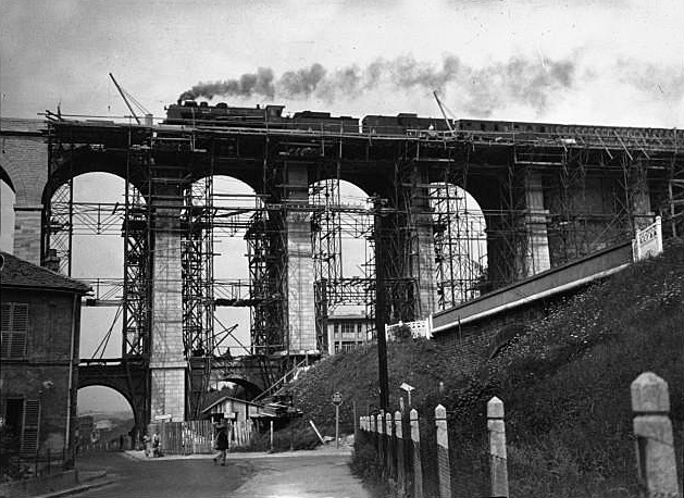 Les travaux du plan Marquet : le viaduc de Meudon [photographie de presse]